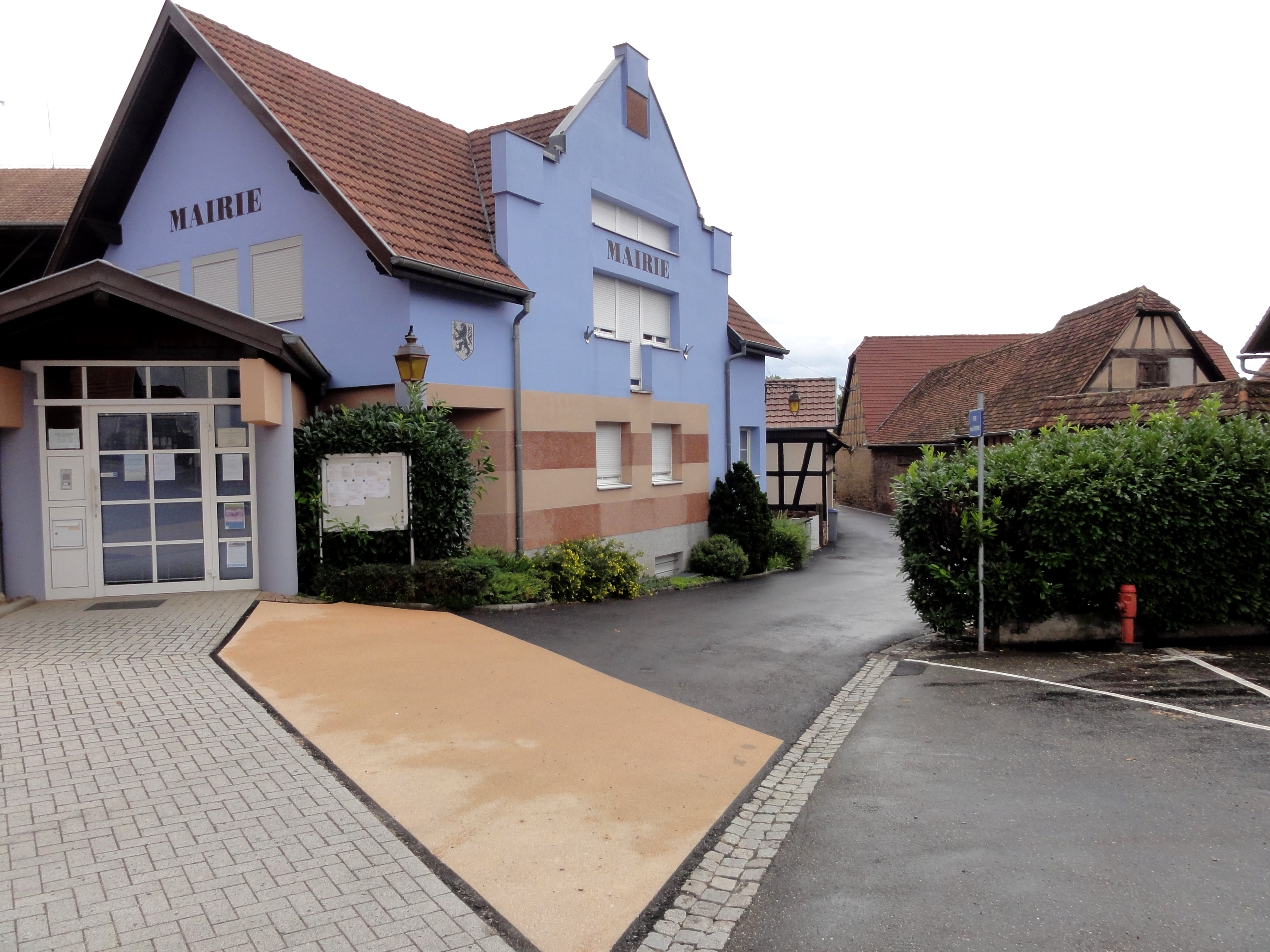 Alsace, Bas-Rhin, Olwisheim, Mairie.